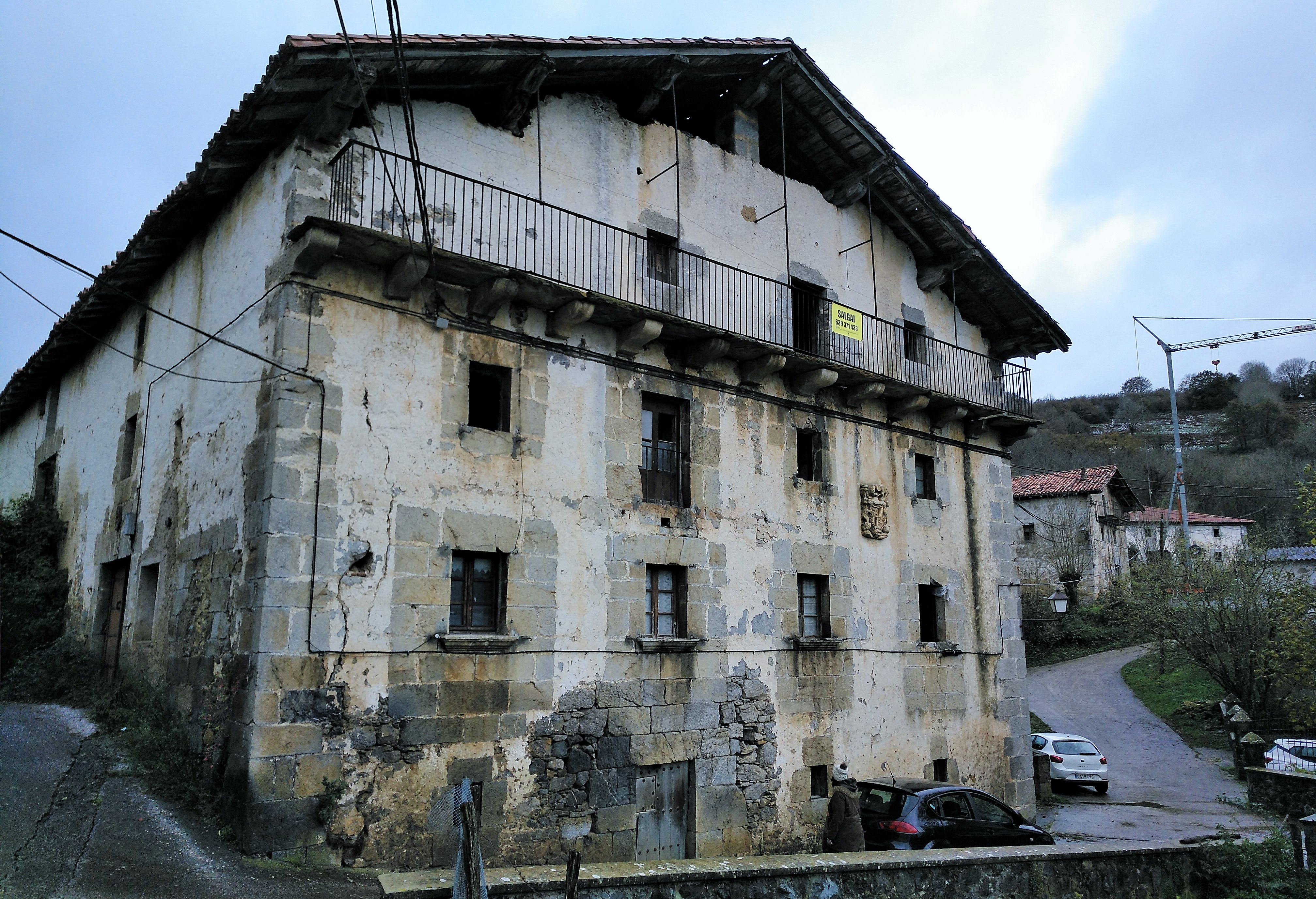 Uitzi herriko Errekalde etxea, Nikolas Ormaetxea "Orixe" idazlea hazi zen lekua